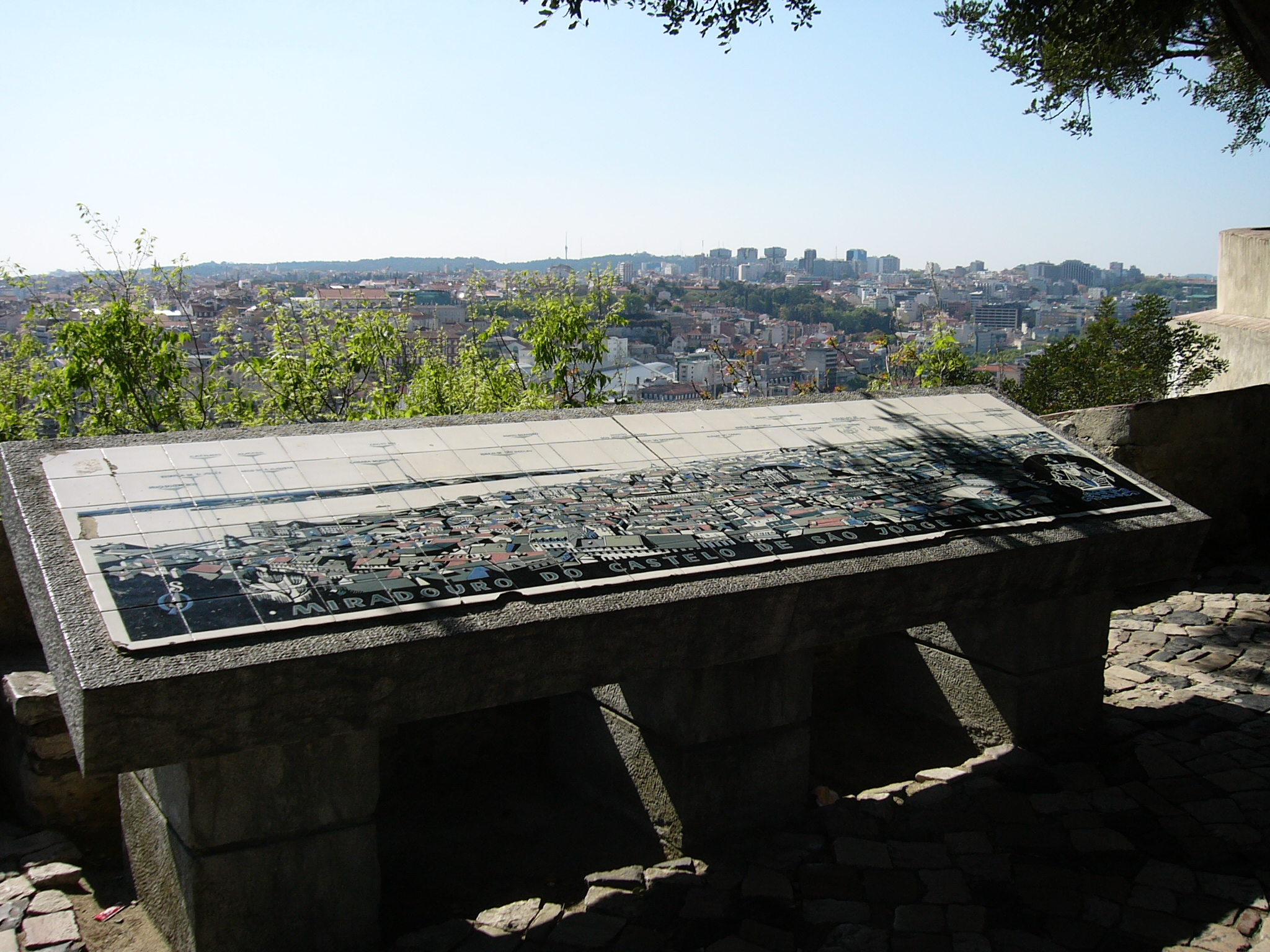 Mirador del Castillo de San Jorge en Lisboa. Foto de Manuel González Olaechea y Franco ©